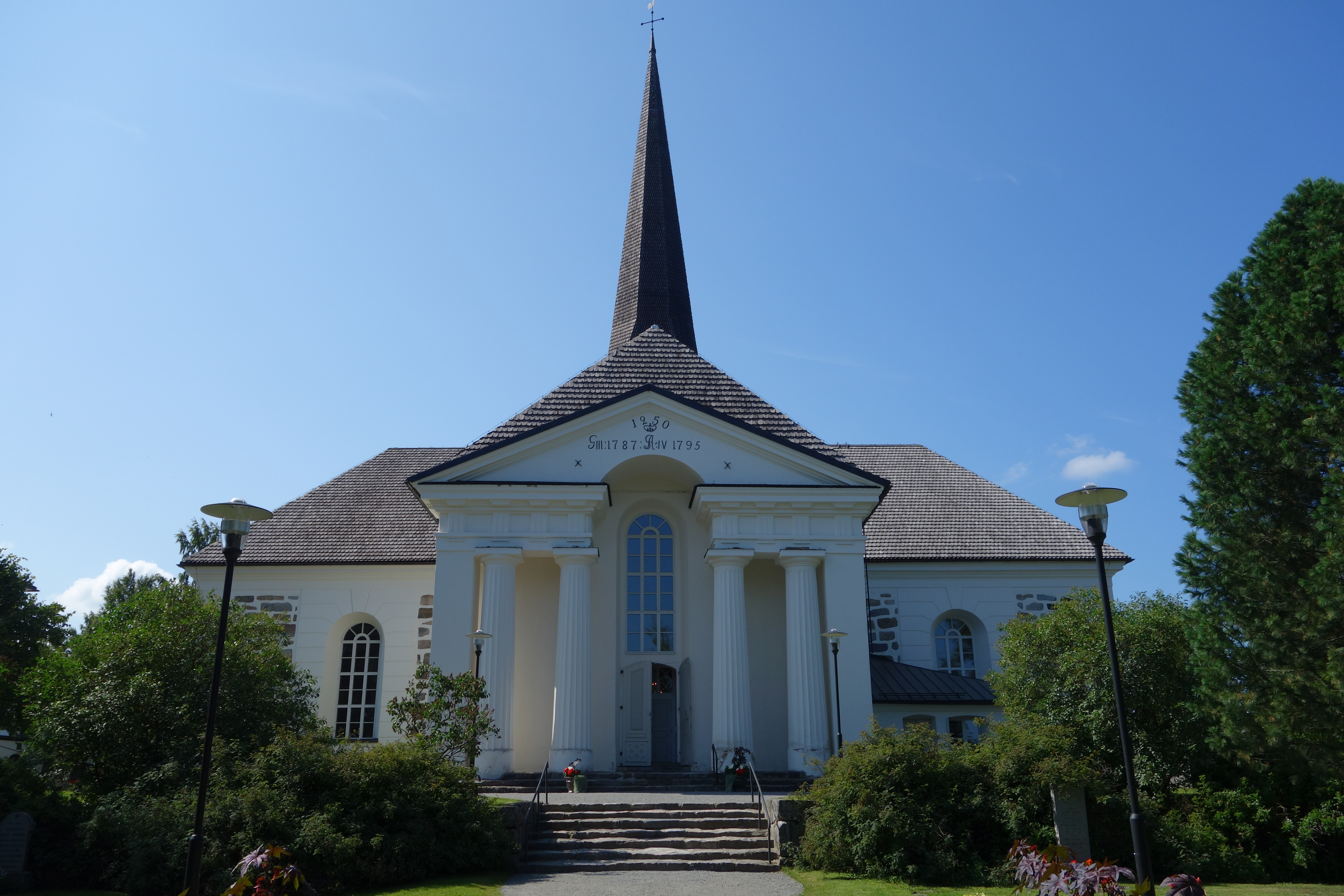 Hovedfasade, motsatt side av klokketårn